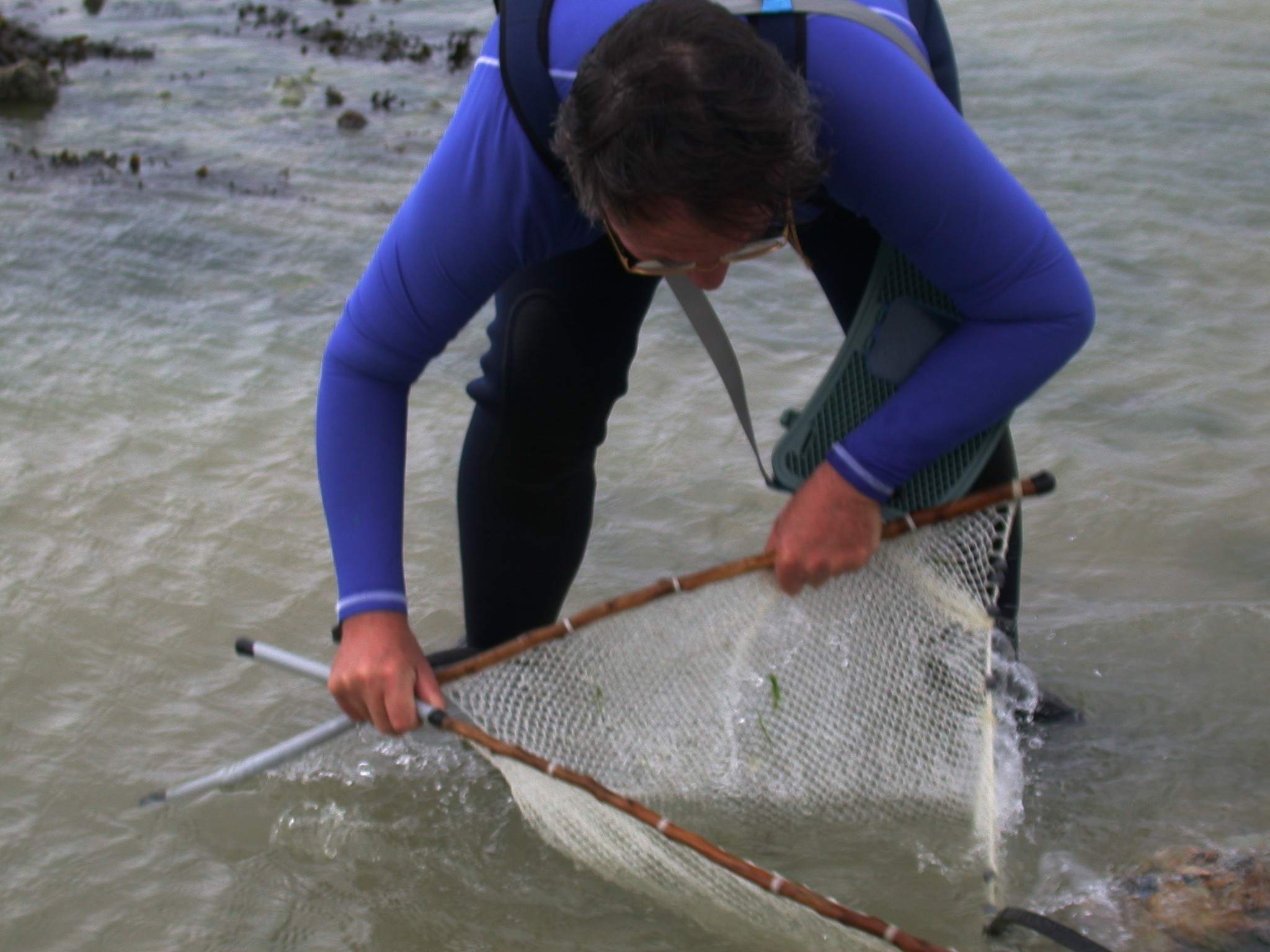 Filet de pêche "la fouine" bien connu sur la côte normande